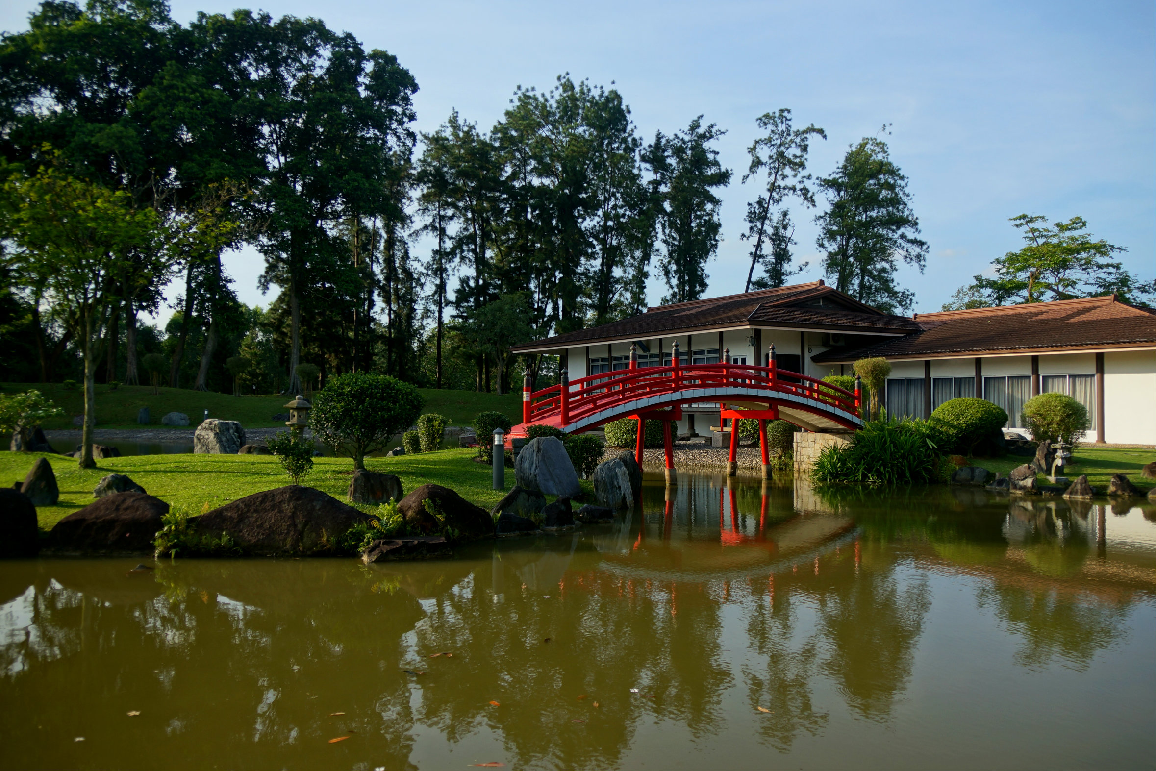 Japanese Garden Sngapore